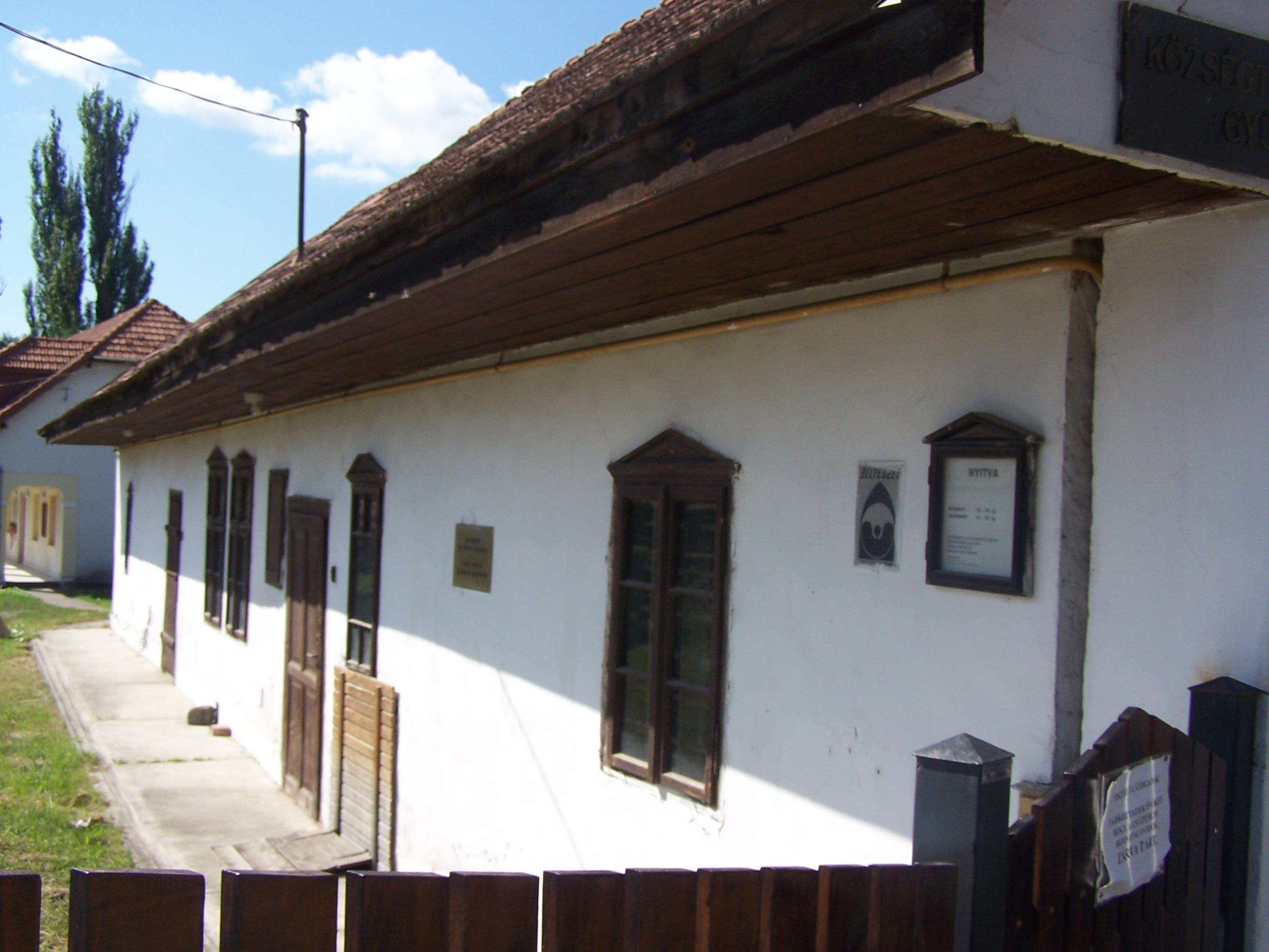 Szerb porta, néprajzi gyűjtemény (Pomáz, Kossuth Lajos utca 48.)